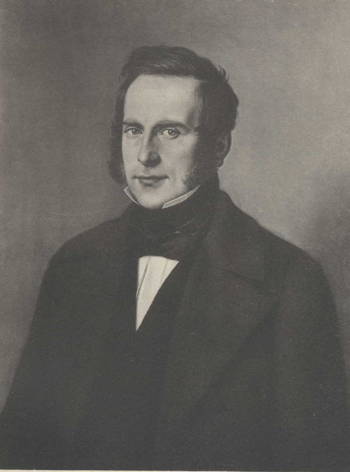 Karl Georg Christoph Beseler